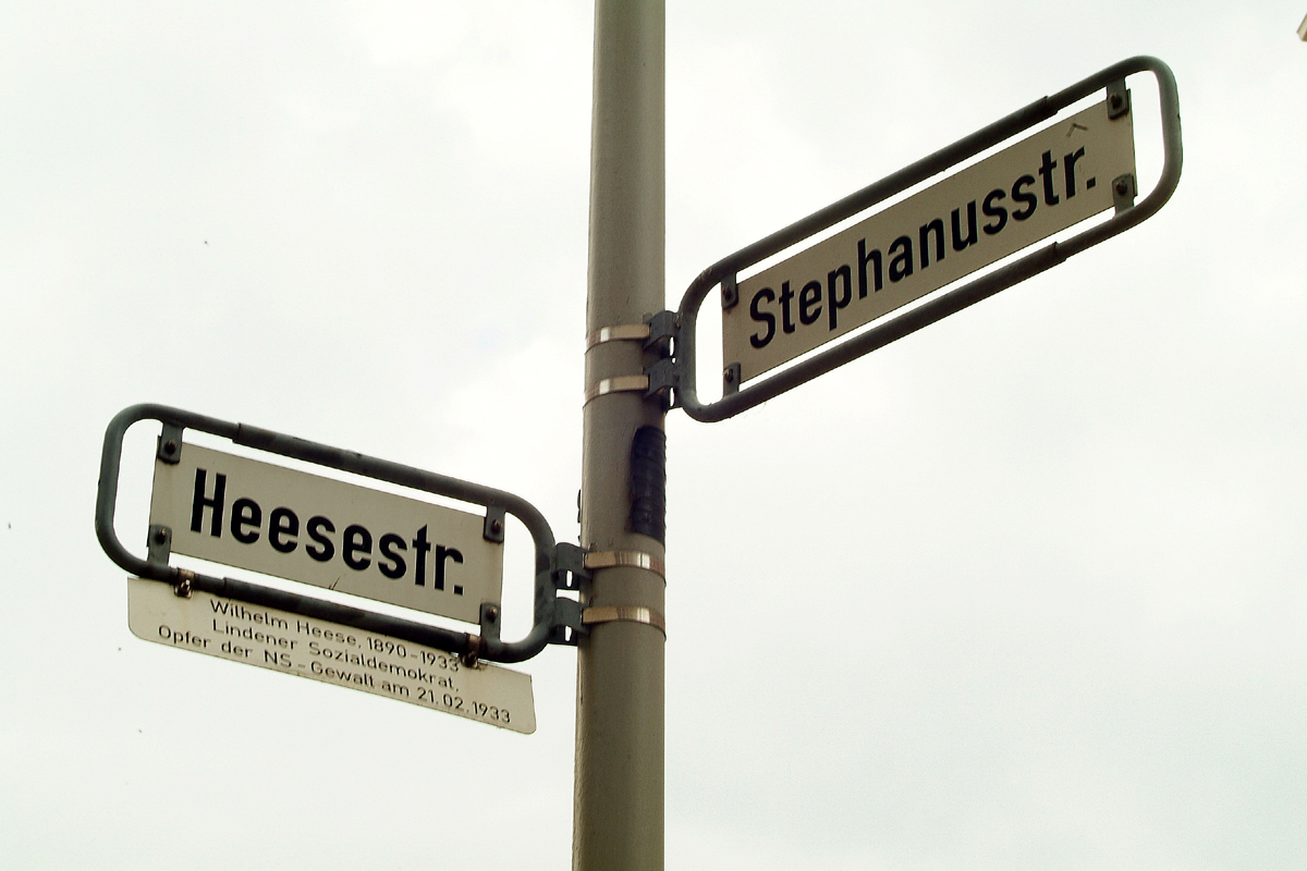 Sie haben ein besseres Bild? Sogar ein historisches Dokument als Bild(ungsförderung)? Zeigen Sie' s uns. Stiften Sie es, allen Menschen.